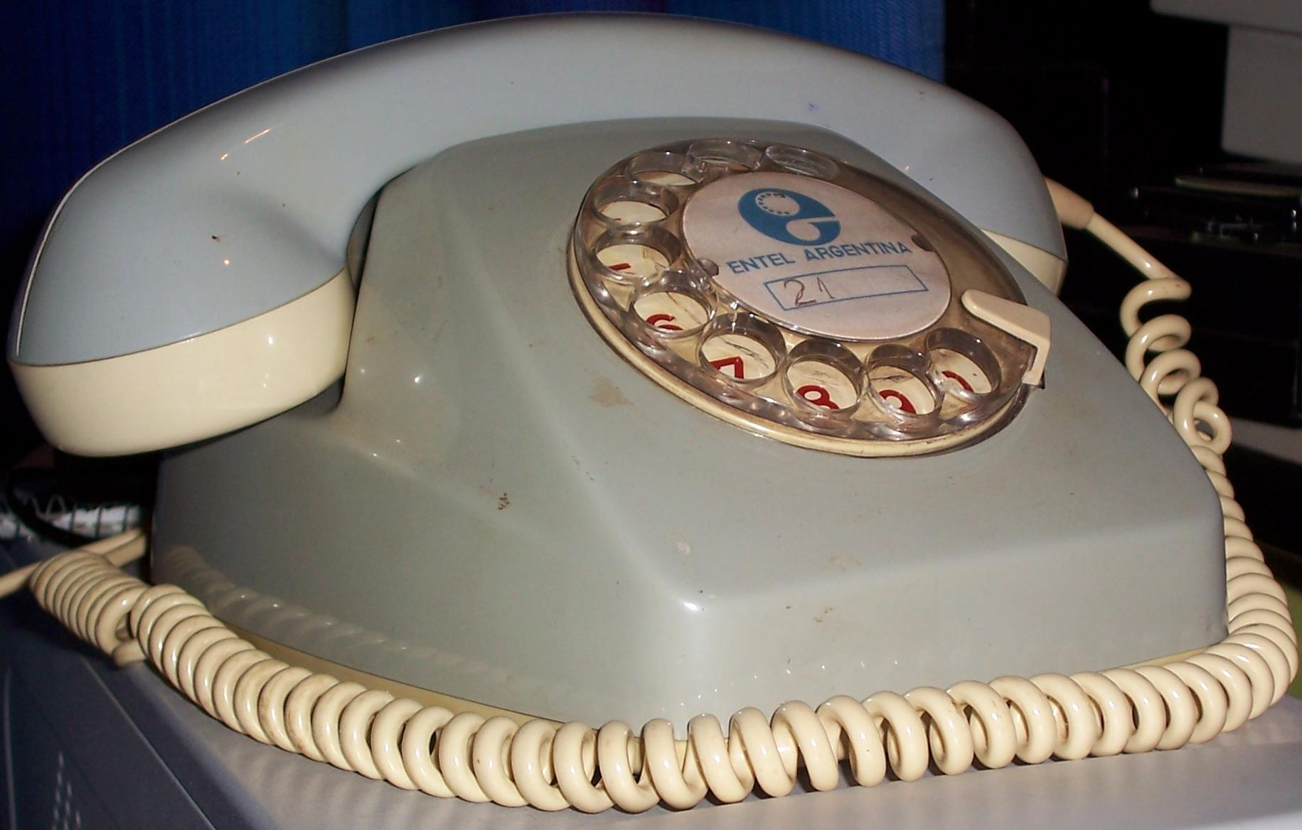 Teléfono de la antigua Empresa Nacional de Telecomunicaciones (ENTel) de Argentina.